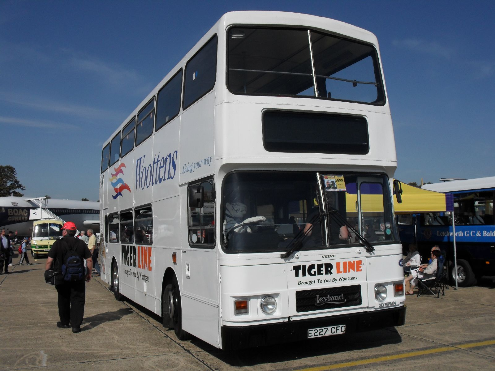 Tiger Line E227CFC